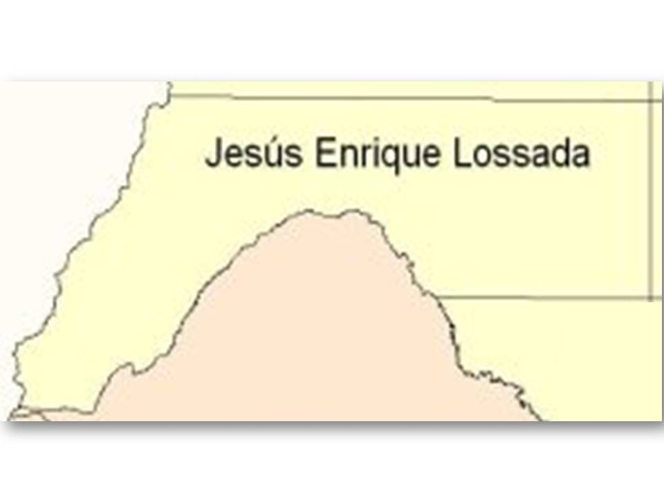 bordes del municipio JEL del Zulia